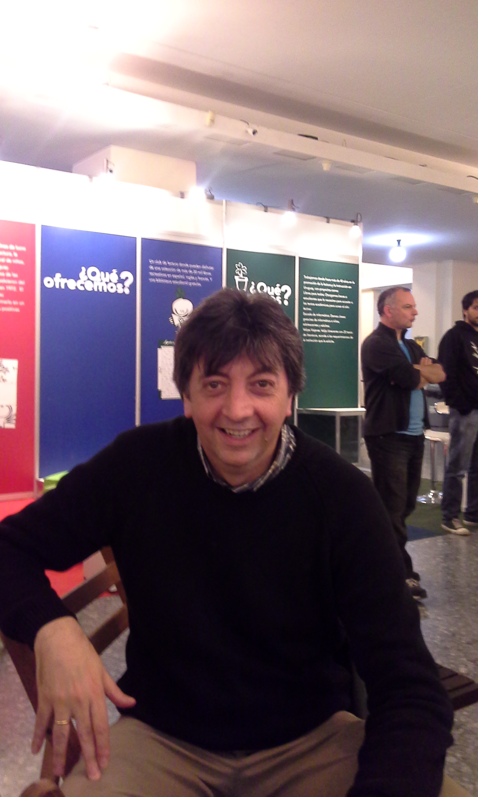 El escritor Marcos Vázquez en la Feria del Libro Infantil y Juvenil de Montevideo.